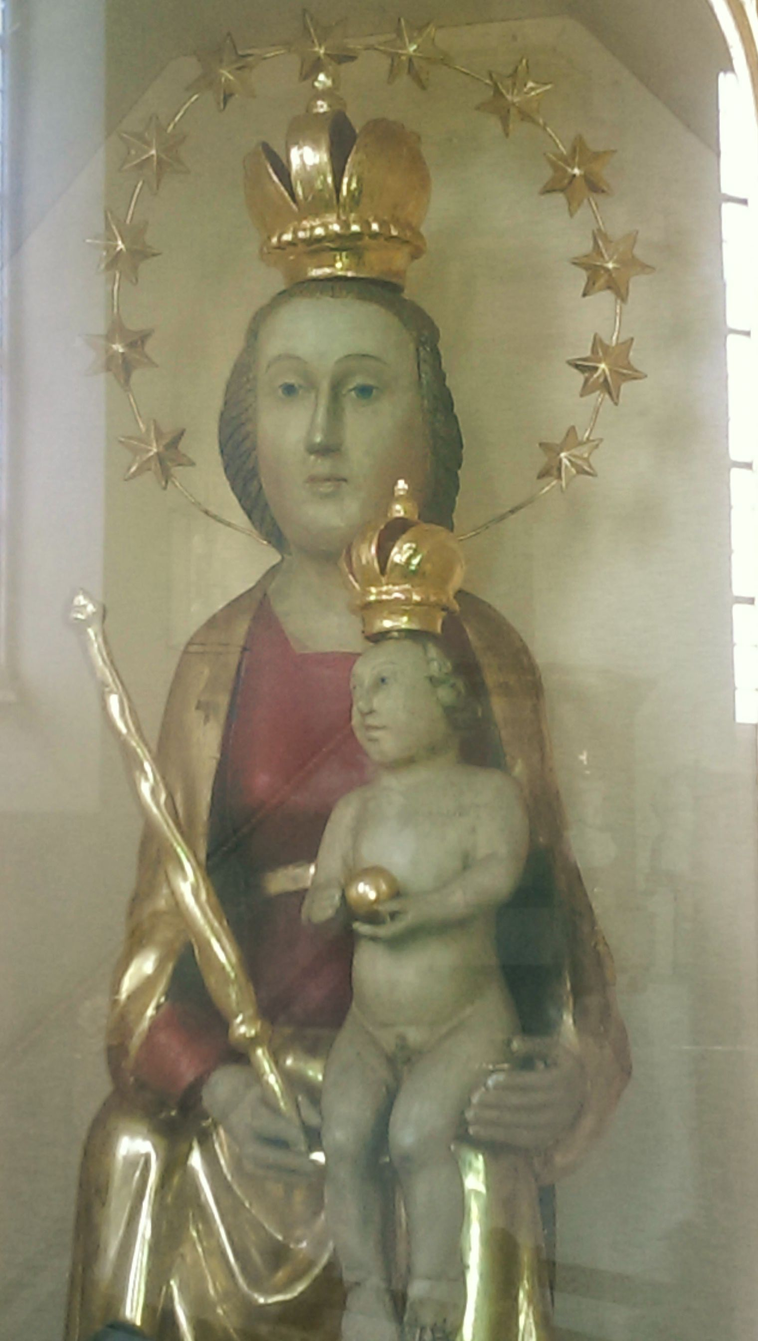 Kirche "Mariä Geburt" in Windheim: Gnadenbild "Unsere liebe Frau von Windheim"